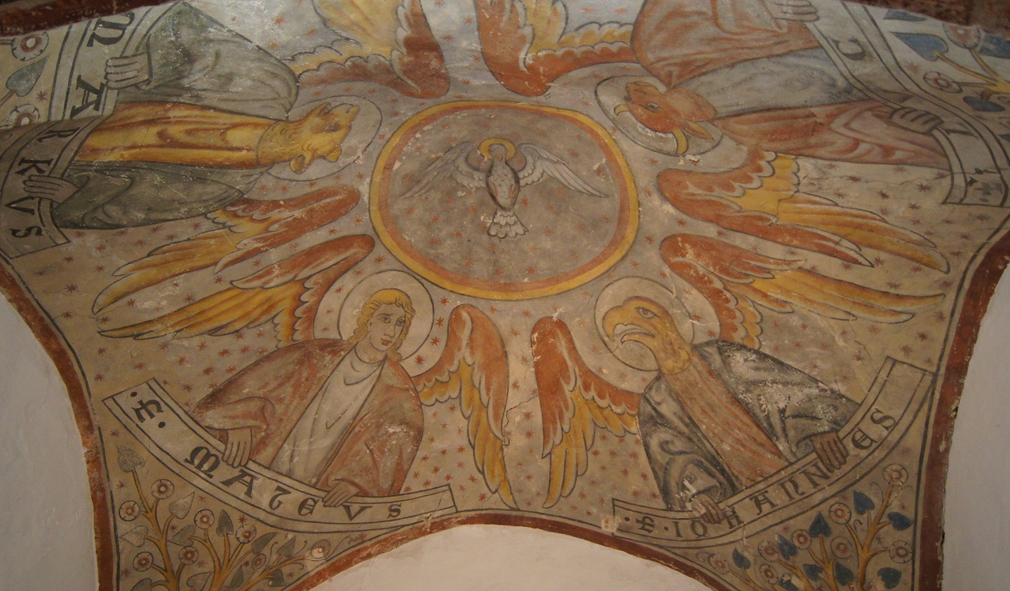 Jakobskirche in Herxheim am Berg, Inneres: Fresken im Chorraum